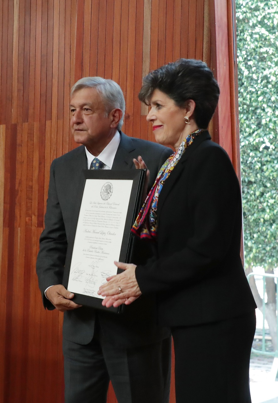 Entrega de Constancia de Mayoría 8 de agosto 2018